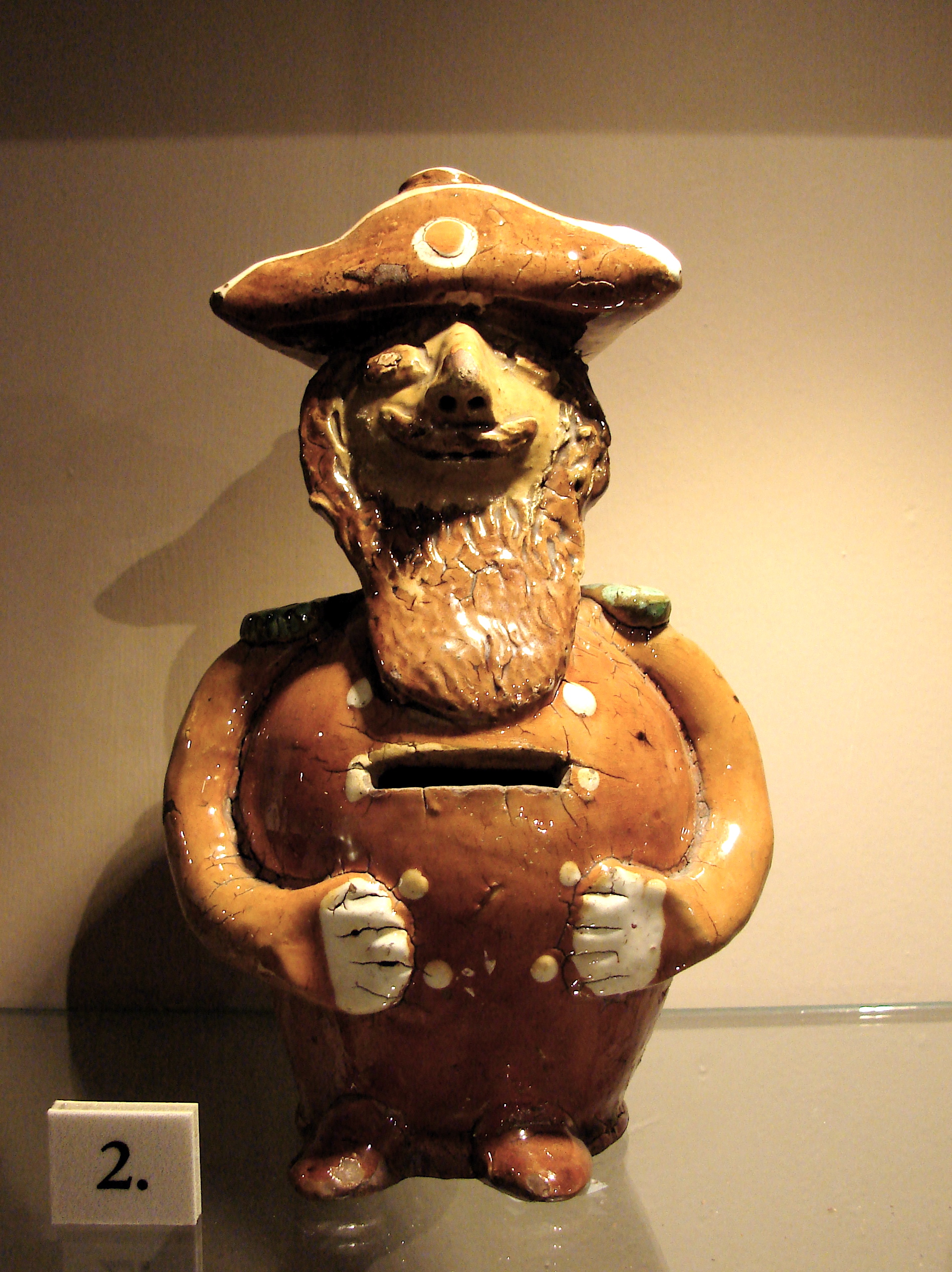 Sparebøsse fra Fossen Potteri i Lunde, Telemark Museum, Skien